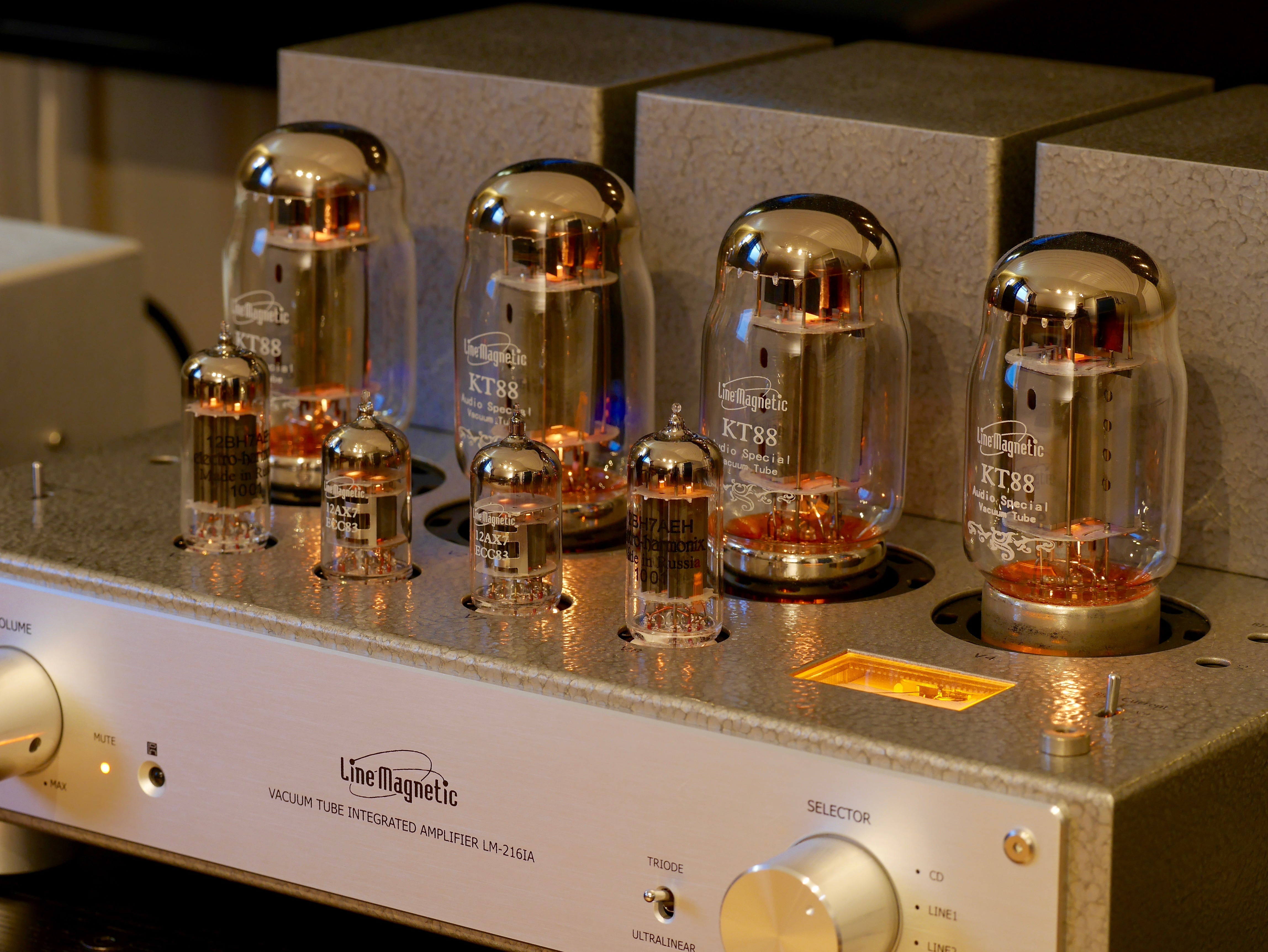 Line Magnetic LM-216IA